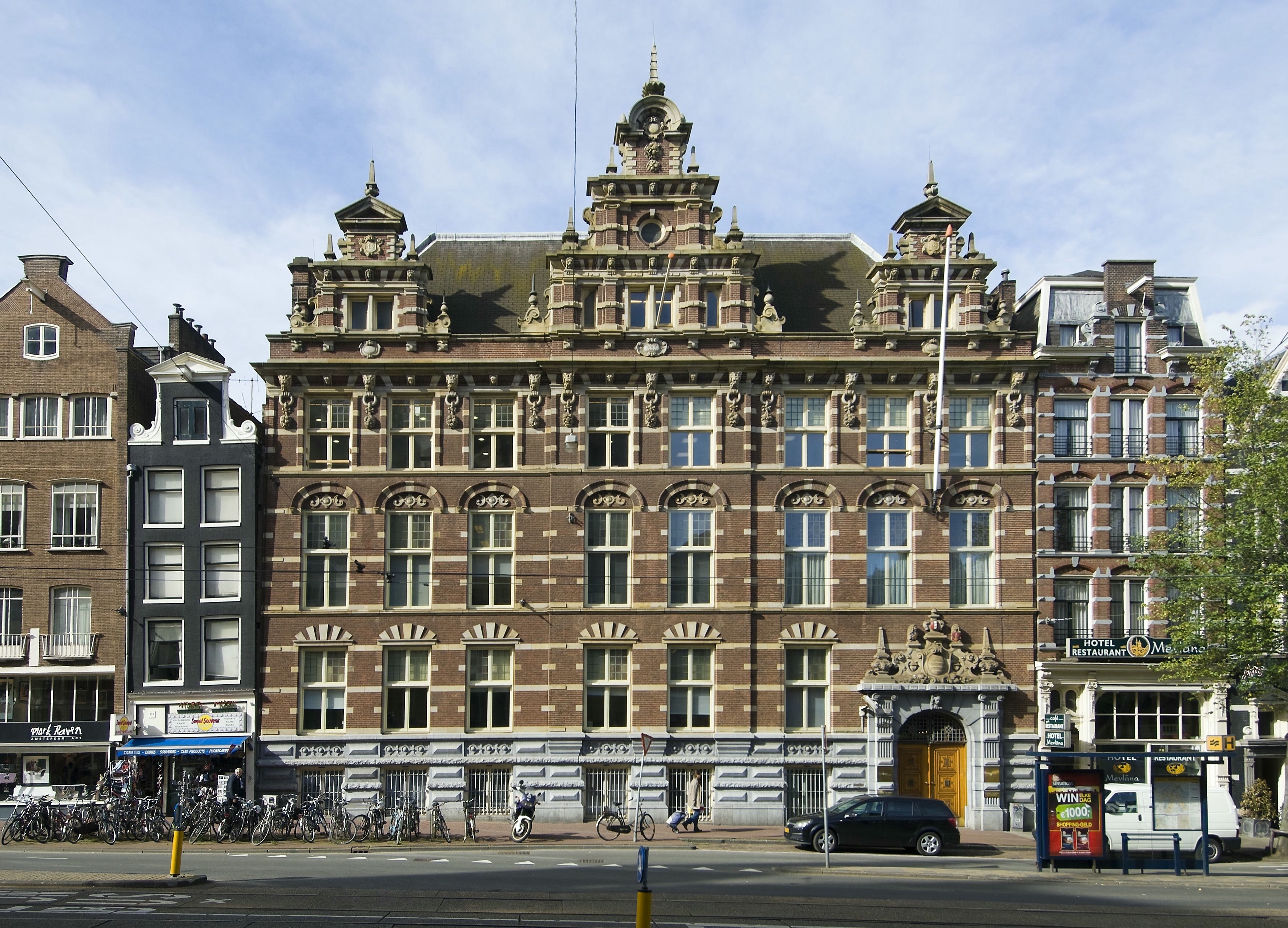 Handels Vereniging Amsterdam (HVA), thans SNS Bank: De voorgevel van de HVA aan de Nieuwezijds Voorburgwal, frontaal van voren gezien